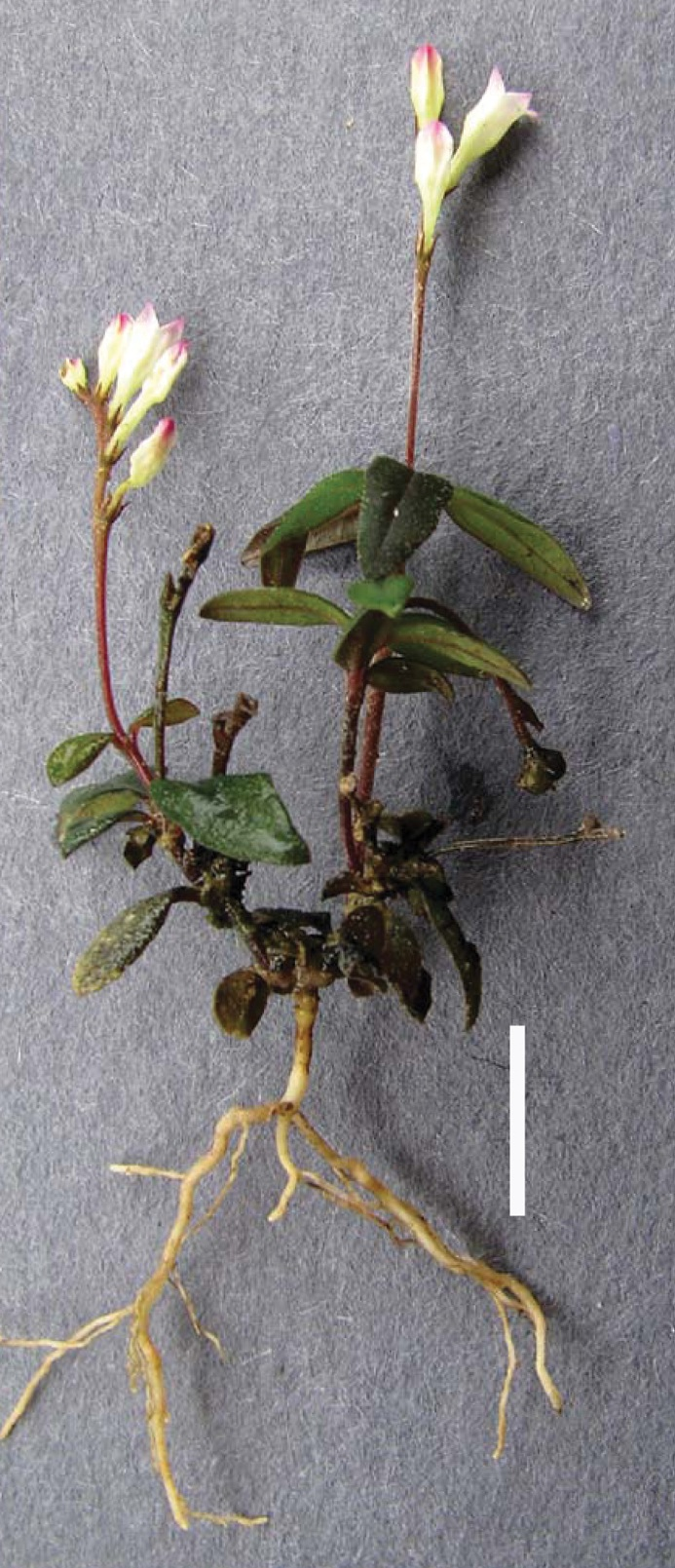 Spigelia genuflexa. Scale bar = 1 cm.